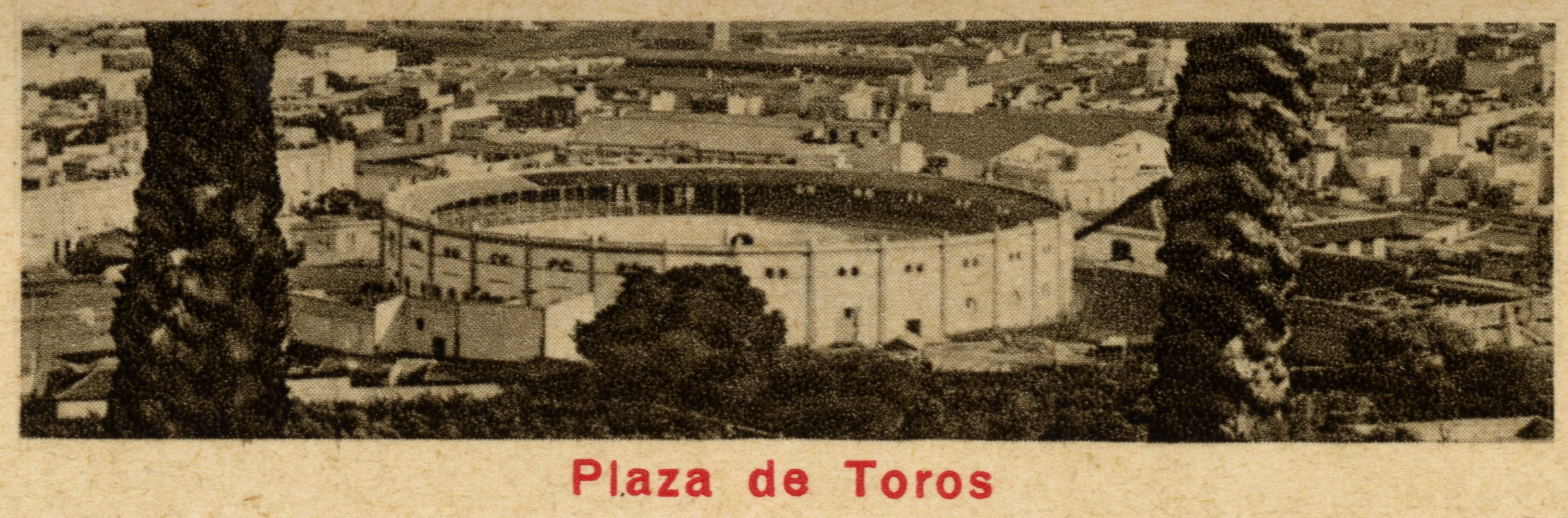 Folleto editado por la Junta de Turismo, Tenerife, entre 1934-1936. Plaza de Toros de Santa Cruz